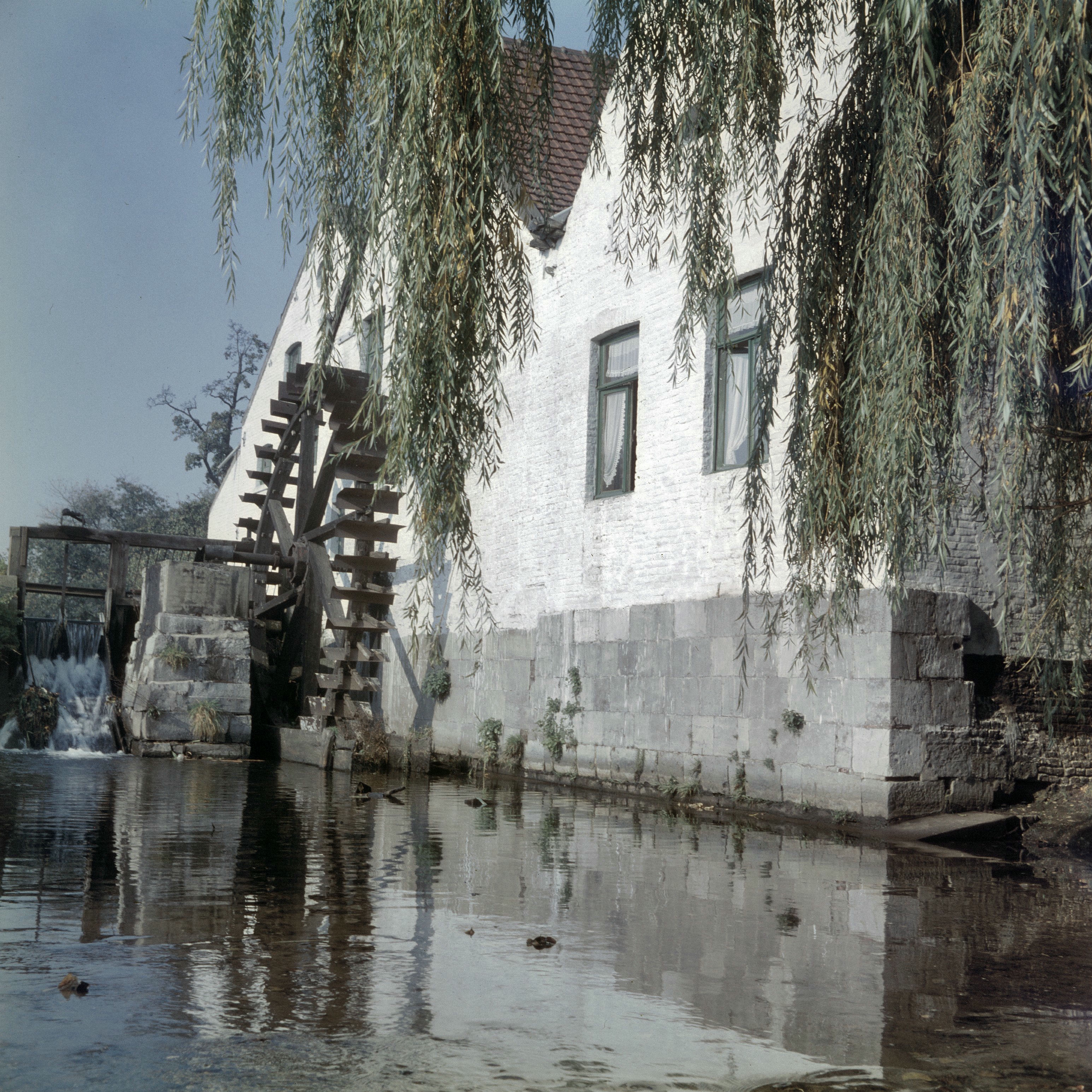 Bosmolen: Overzicht met metalen onderslagrad (opmerking: Diacollectie Molens)